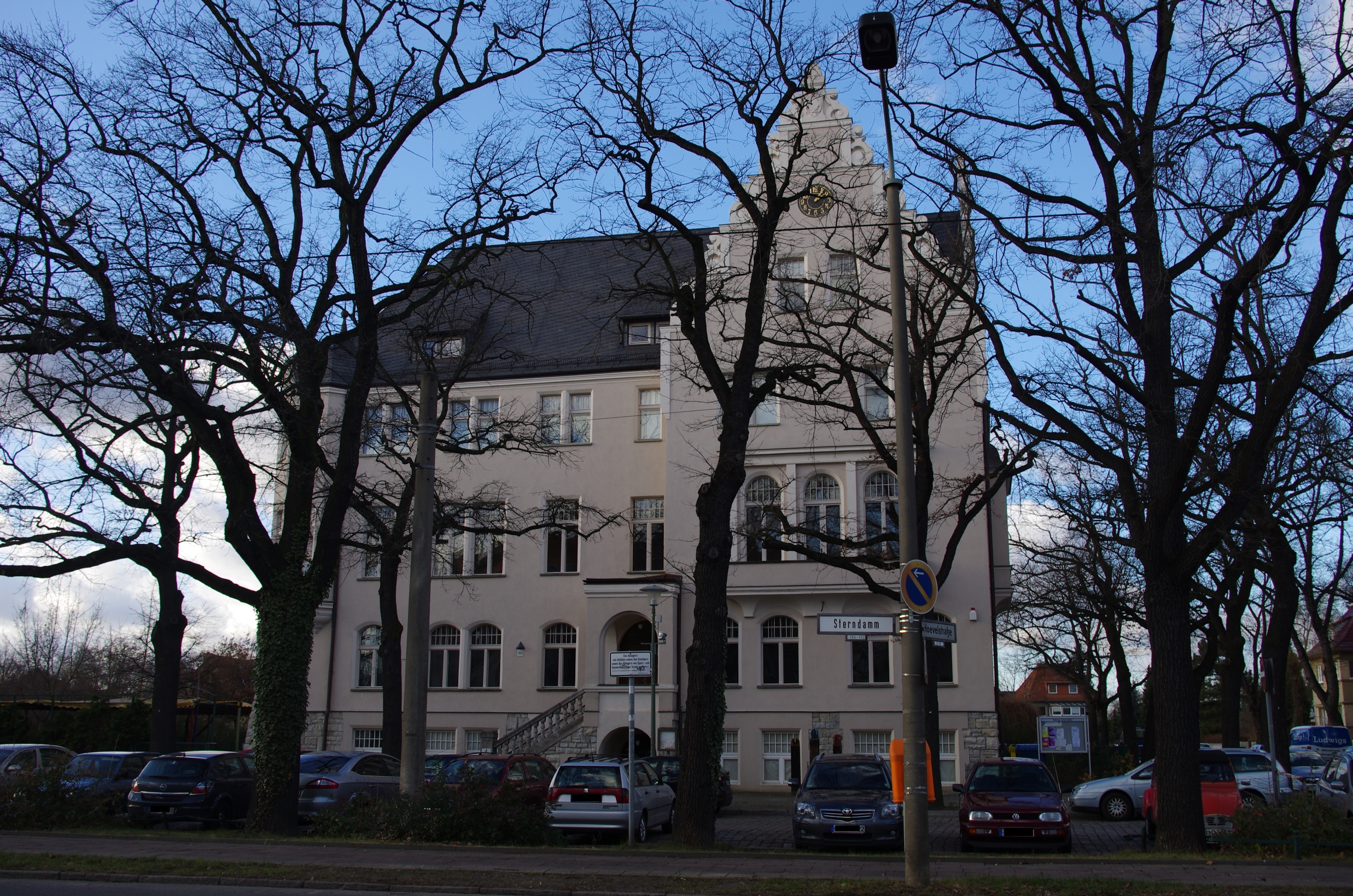 Johannisthal in Berlin. Das Haus Sterndamm 102 steht unter Denkmalschutz. In dem haus befindet sich das Rathaus Johannisthal.